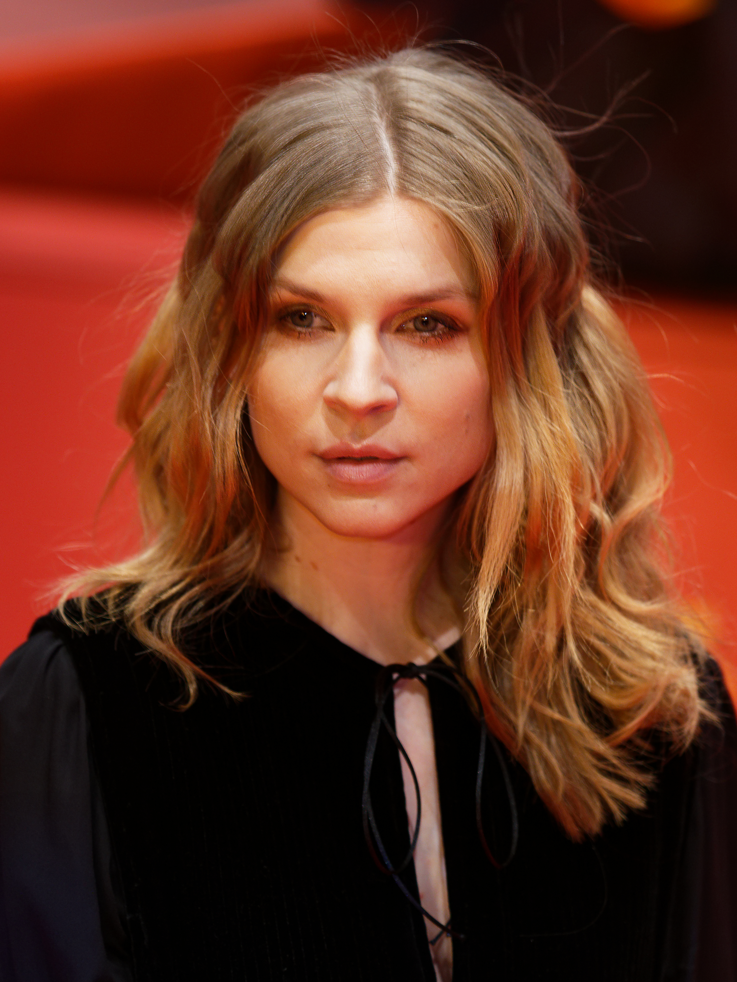 Clémence Poésy bei der Premiere von Final Portrait bei der Berlinale 2017